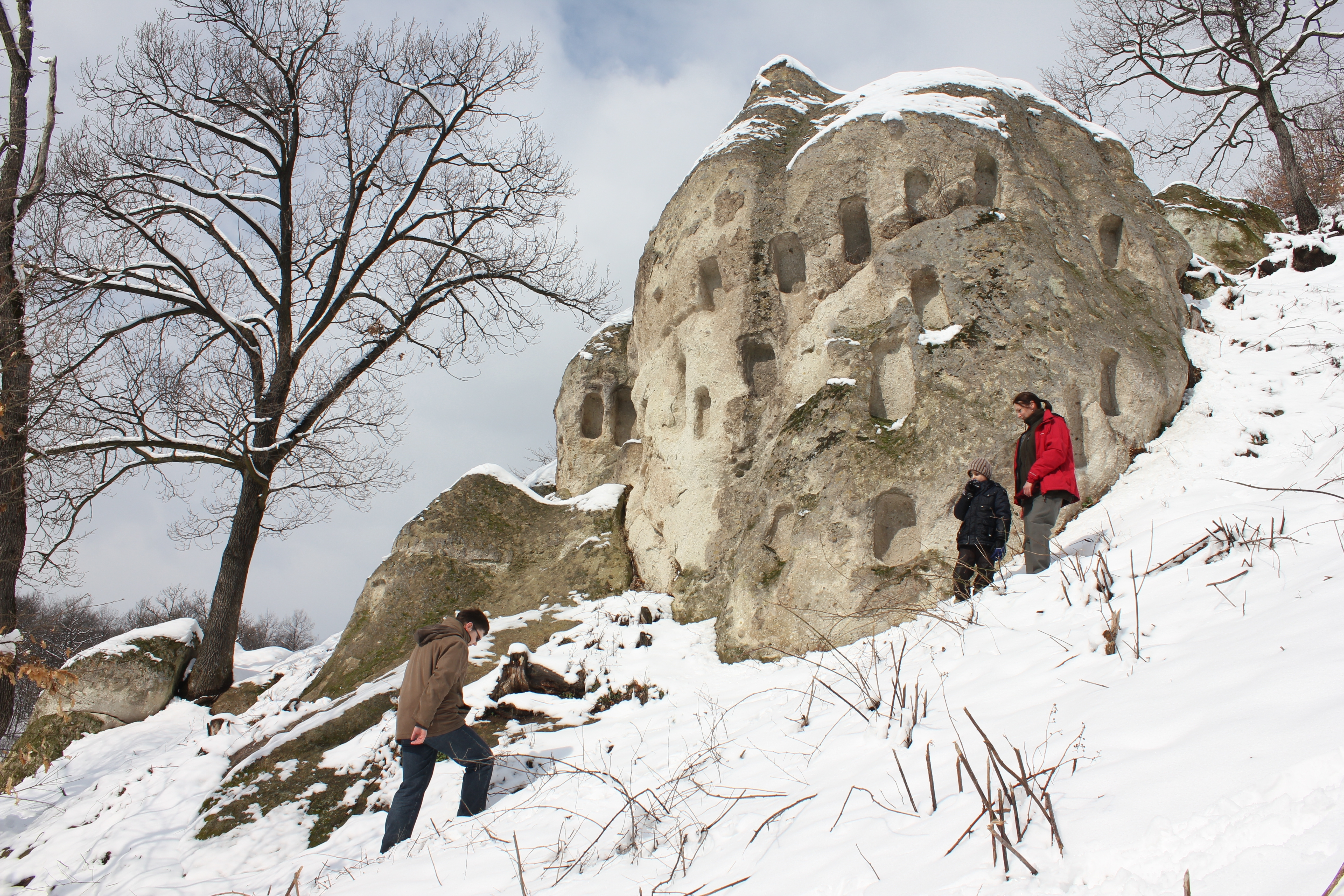 B7a. Szomolya Kaptár-rét, 4. szikla